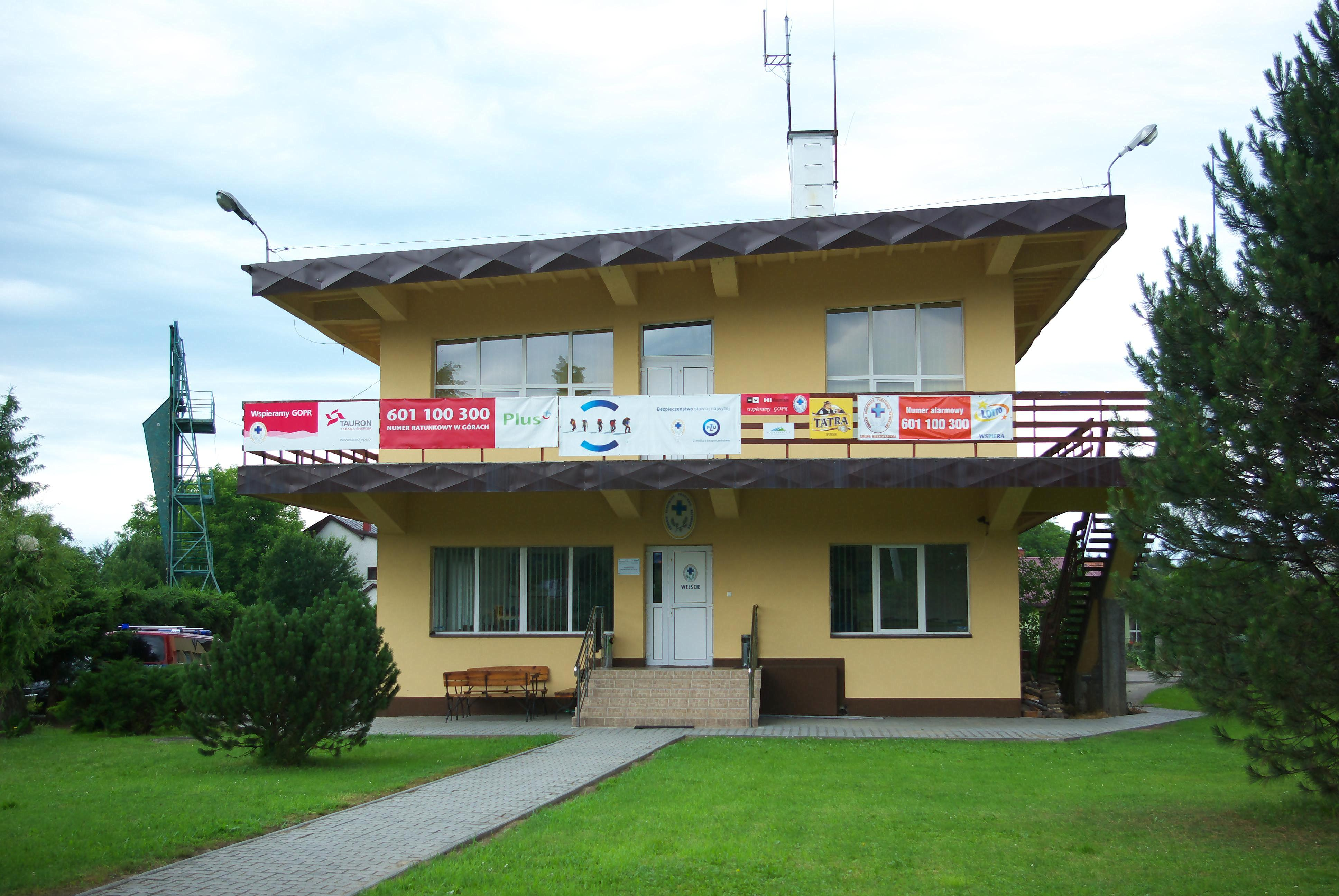 Budynek bursy przy ulicy Mickiewicza 49 w Sanoku. Siedziba GOPR